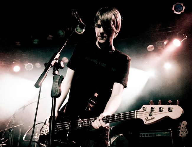 Punk TV на О2ТВ